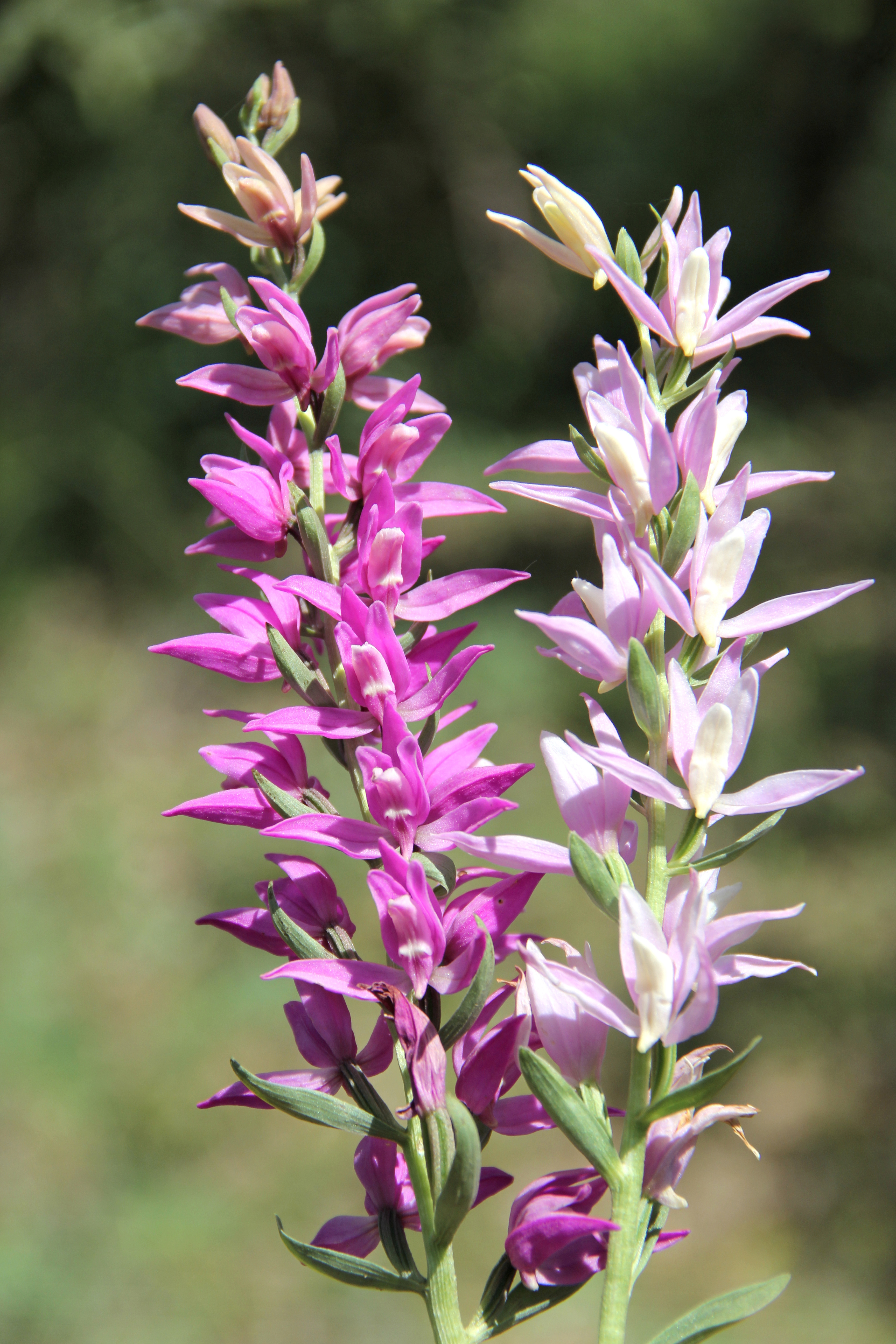 Yer:Mardin Cephalanthera kurdica